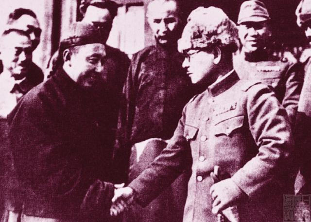 甘粕重太郎中将と握手する徳王